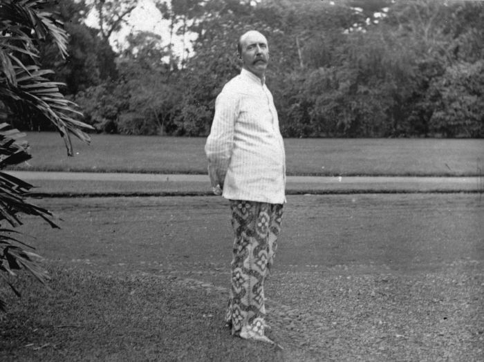 Foto. Dr. M. Treub voor het huis in slaapbroek en kabaai, 's Lands Plantentuin, Buitenzorg.